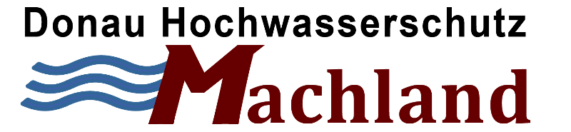 Neuerstellung/Nachzeichnung des Donau Howasserschutzverbandes Machland